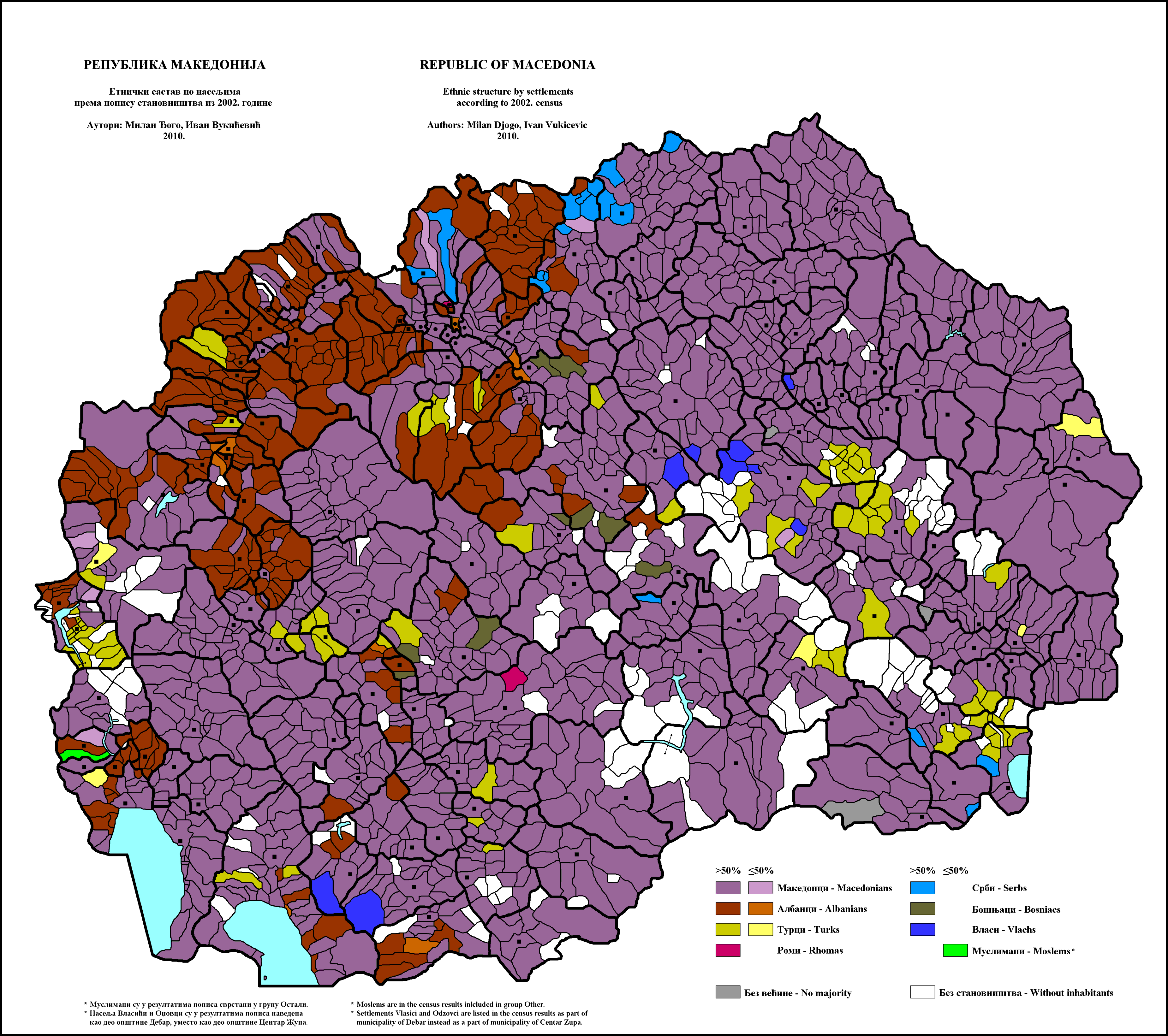 Етнички састав Македоније по насељима 2002. године. Аутори: Милан Ђого - , Иван Вукићевић